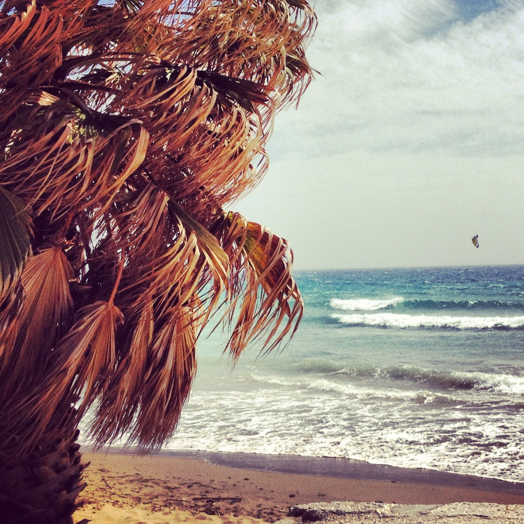 Χρυσή Ακτή Πάρος